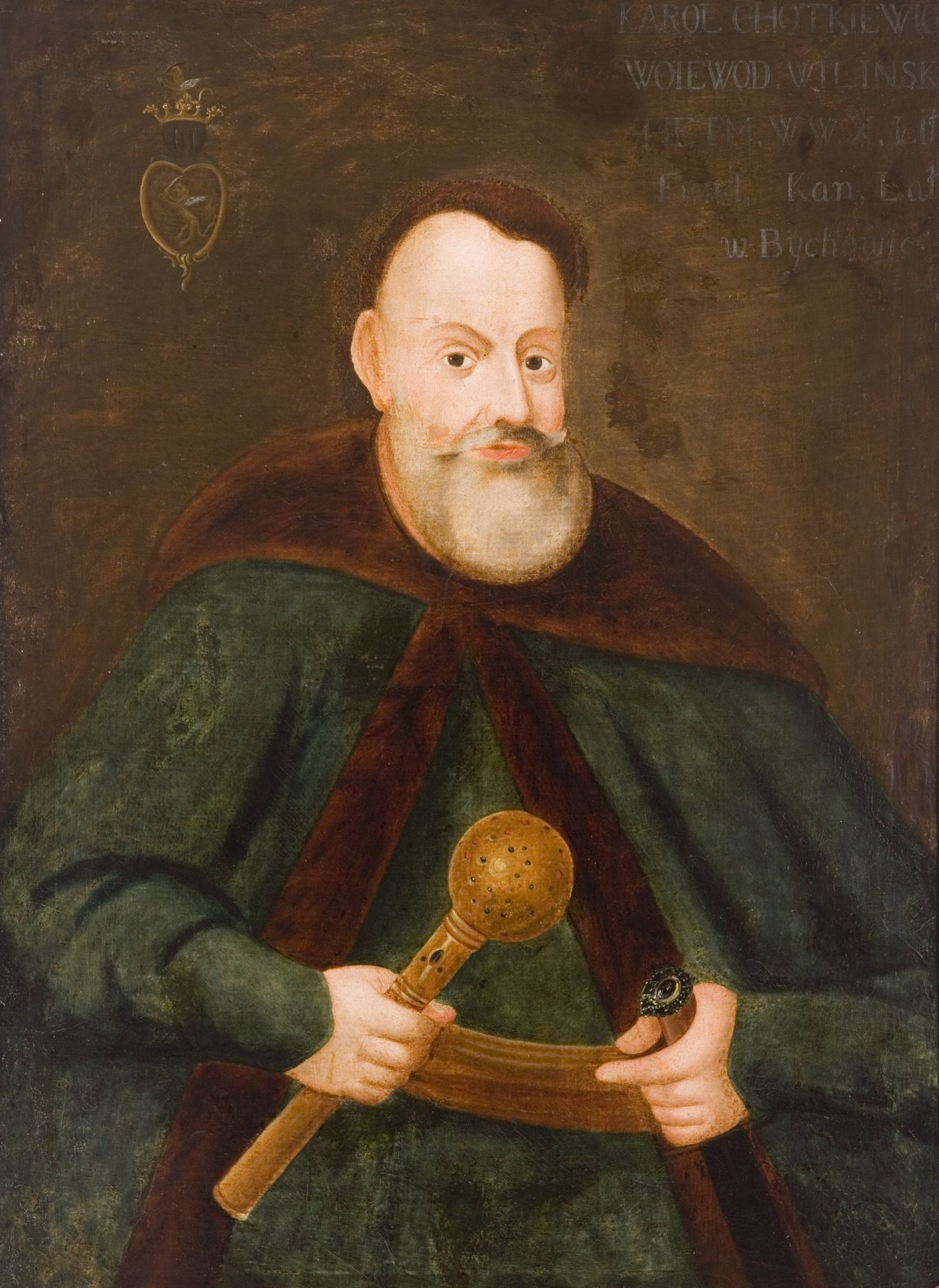 Беларуская (тарашкевіца): Партрэт Яна Караля Хадкевіча (Jan Karal Chadkievič)